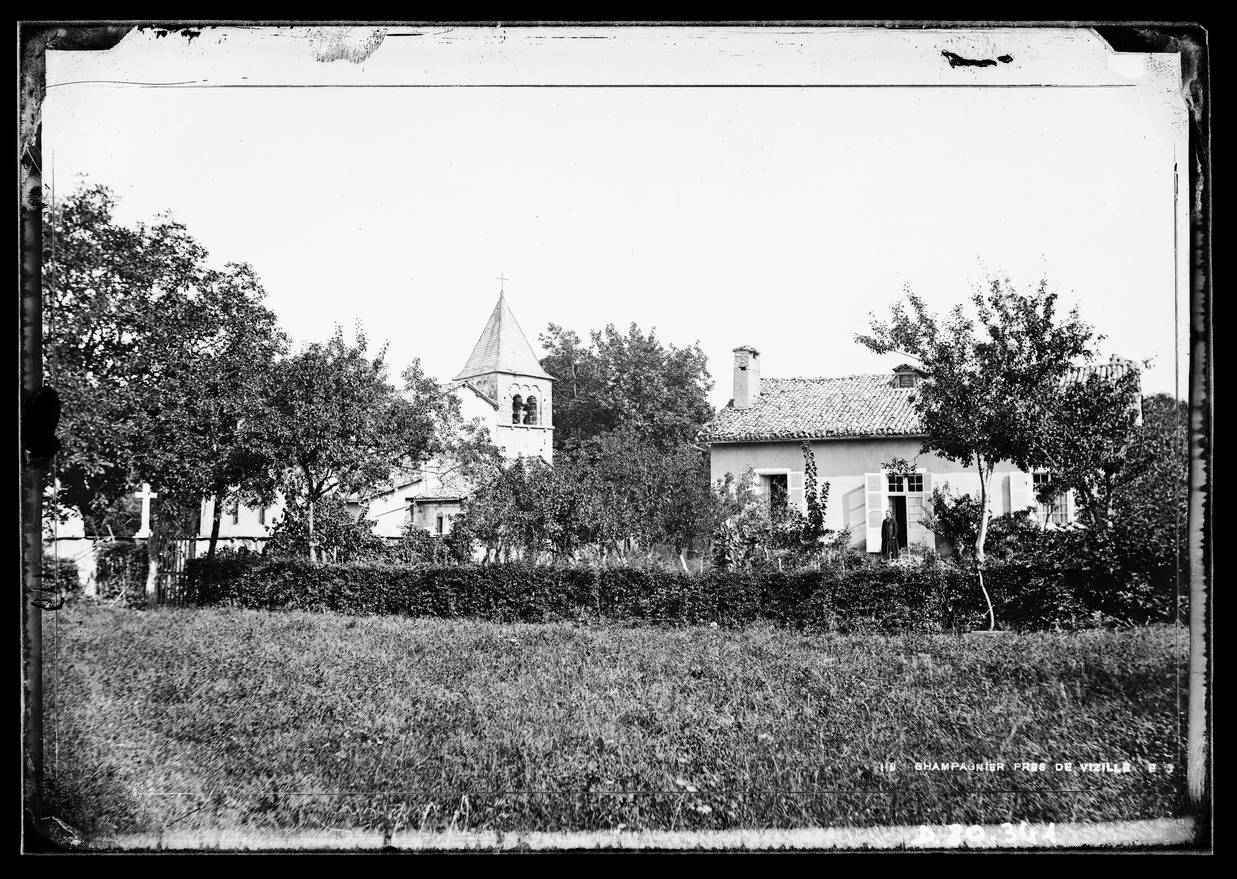 Champagnier, Isère, France. Photo de la seconde moitié du XIX siècle.